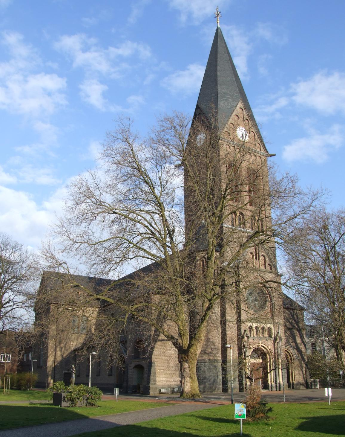 Katholische Kirche Sankt Audomar in Frechen